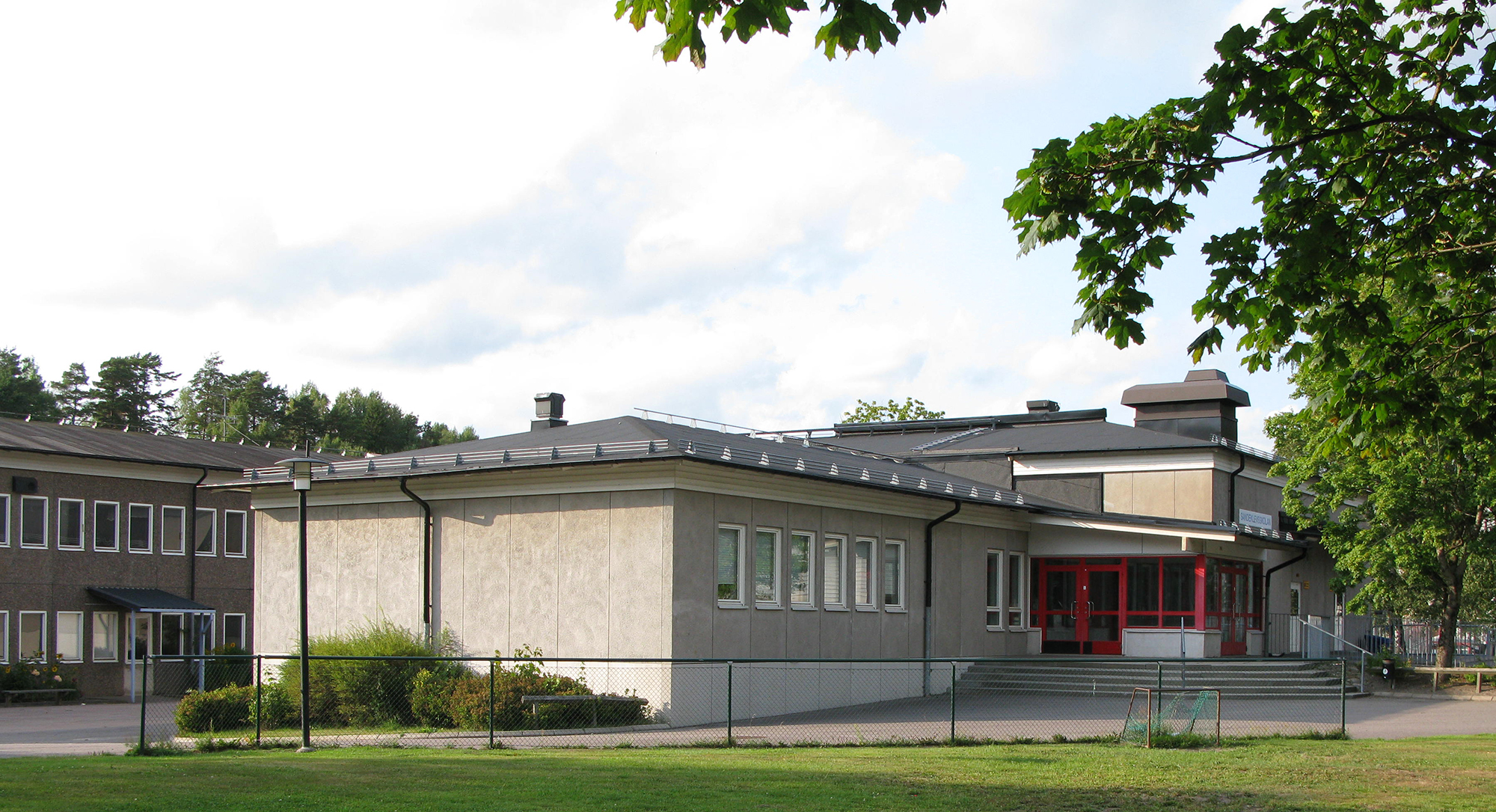 Sandeklevsskolan. Elementary school in Bergsjön, Göteborg